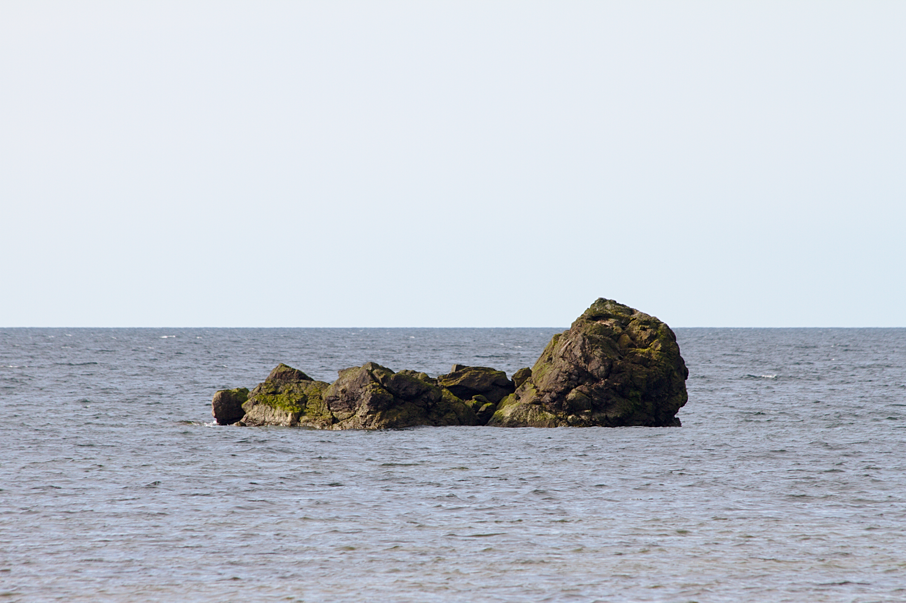 Neugrundbretšast hiidrahn Osmussaare maastikukaitsealal. Kutsutakse ka "Kormorani kiviks"